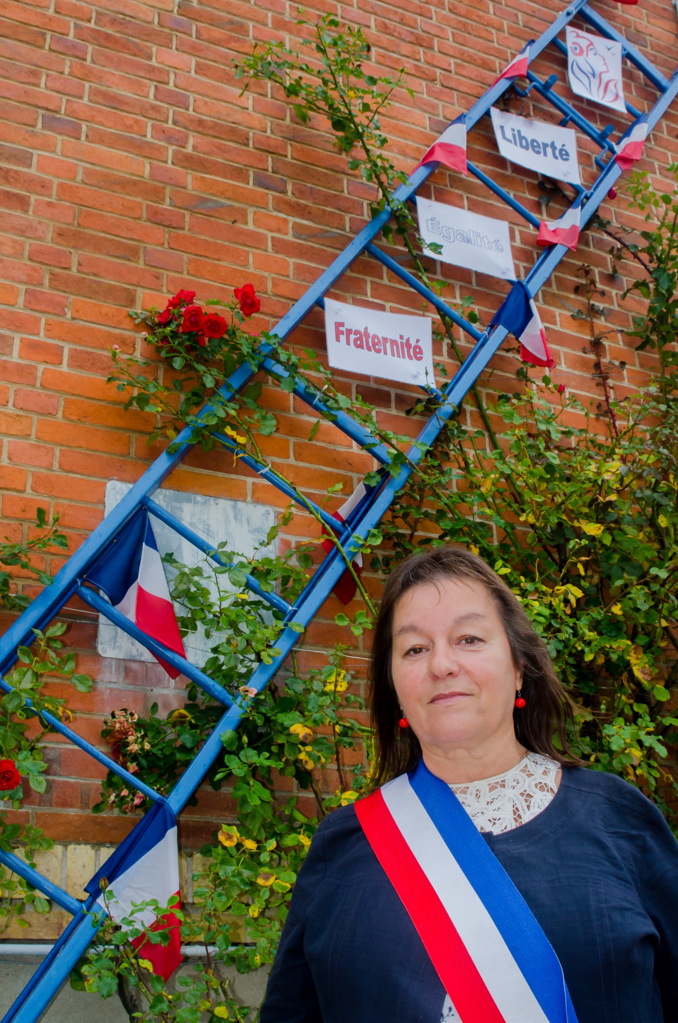 Le maire de Villemurlin Nicole Lepeltier